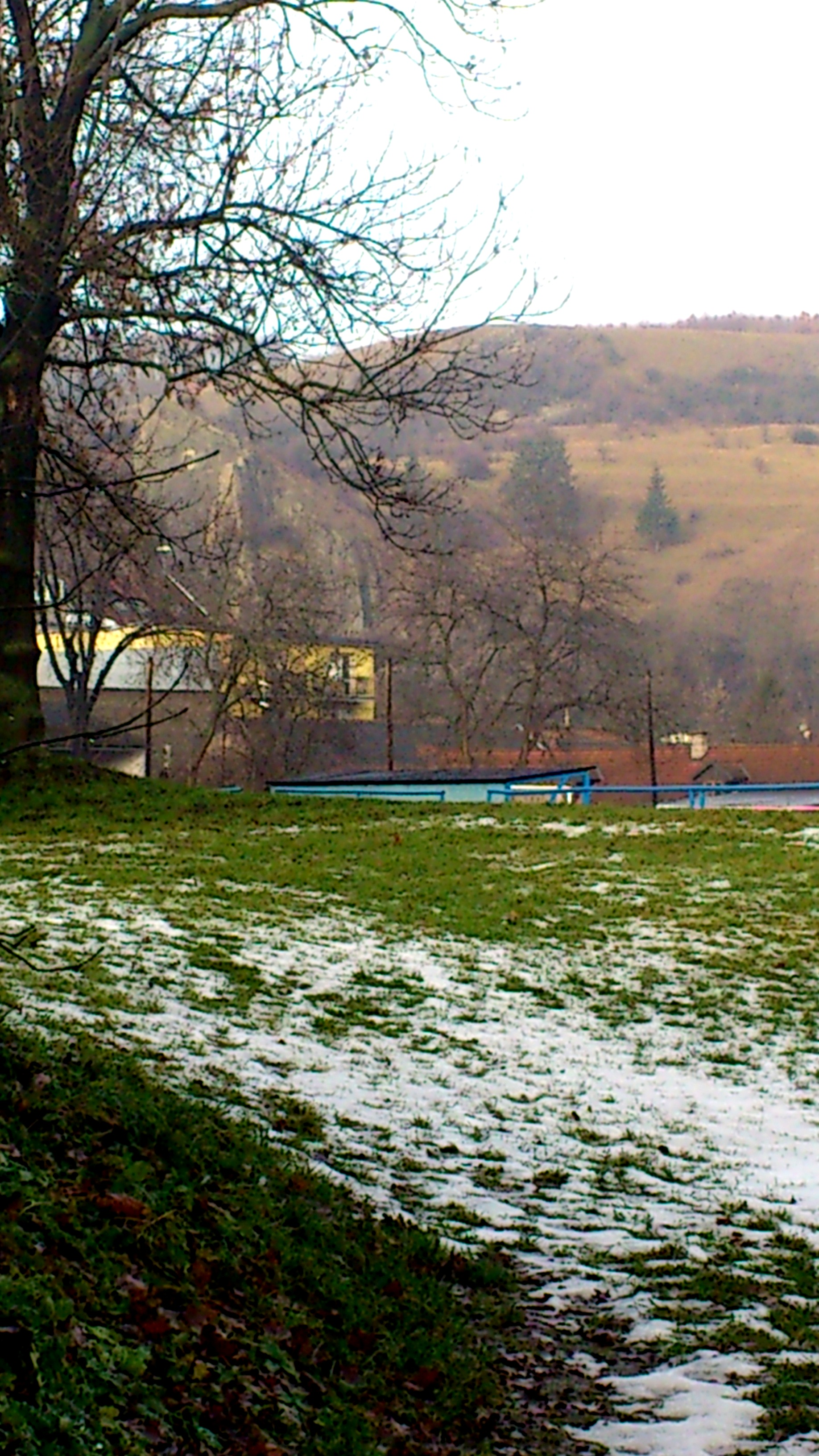 Prokopské údolí-okraj